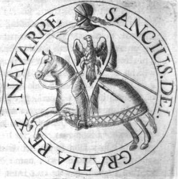 Sancho VII. Navarrský